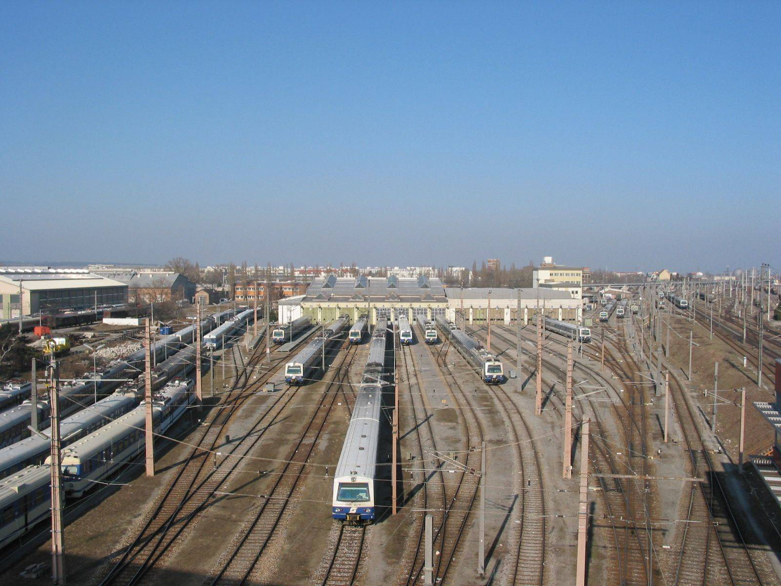 de: Hauptwerkstätte Floridsdorf en: Depot Floridsdorf